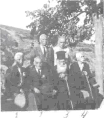 Hristo Nastev, Luka Dzherov, Toma Nikolov Yordan Trenkov